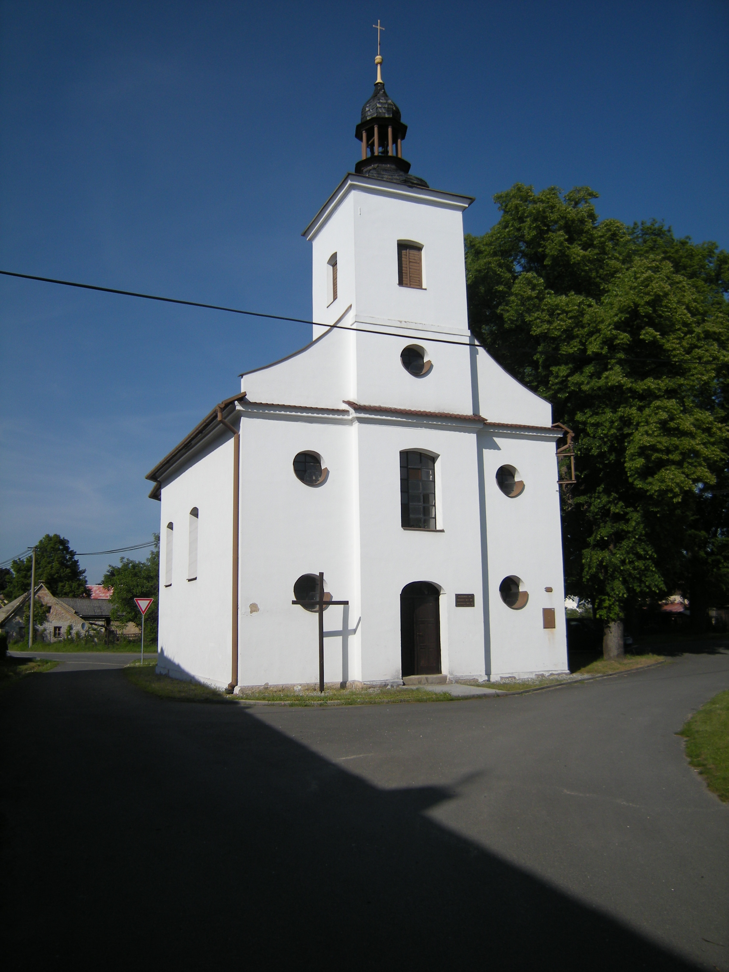 Kościół we wsi Velká Kraš w pobliżu Vidnavy